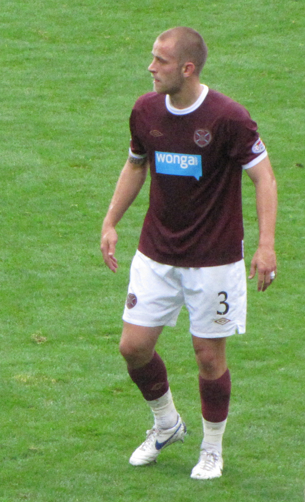 Danny Grainger - Hearts - Celtic 2:0